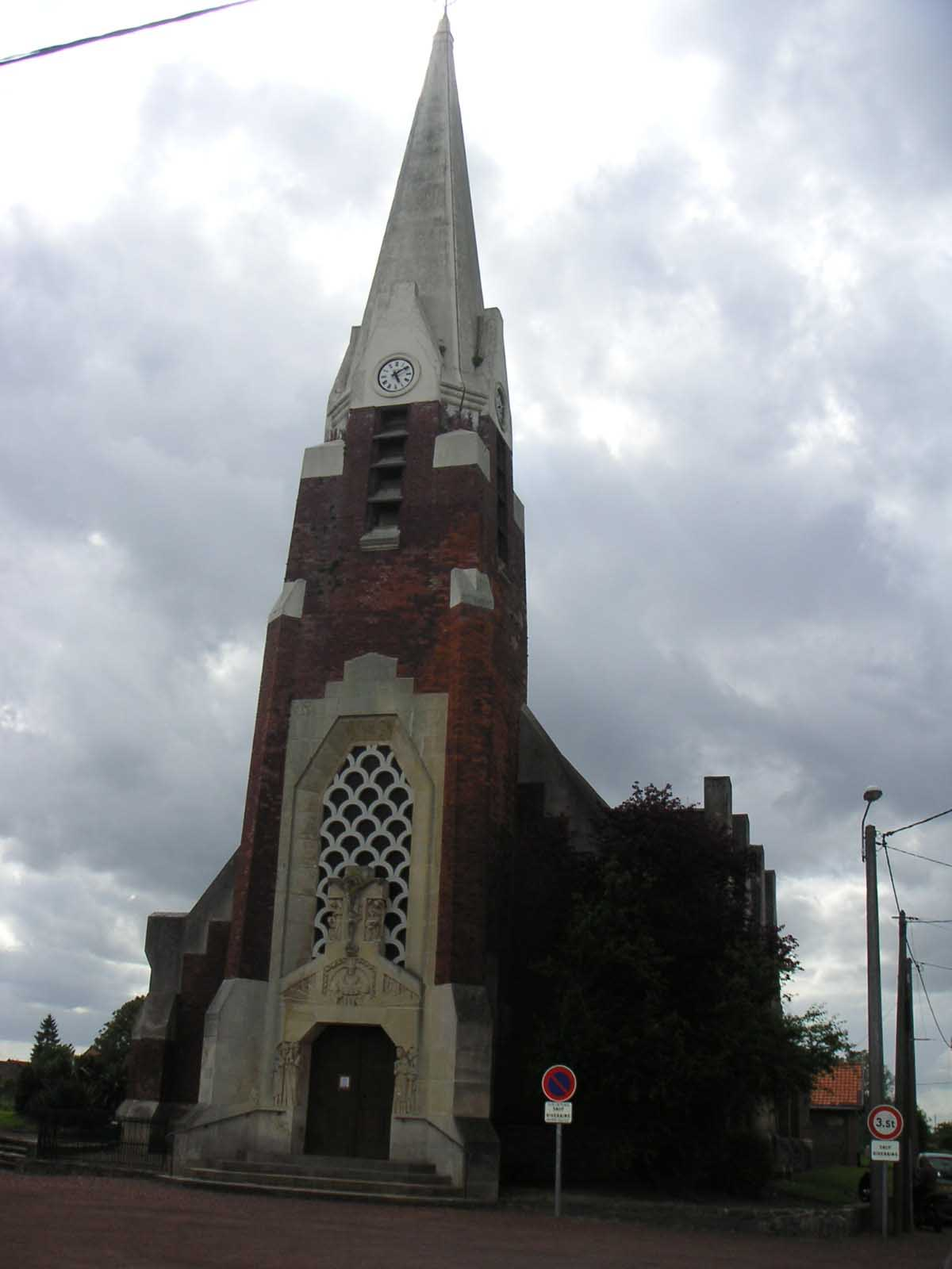 Façade de l'église de Sauchy-Cauchy (Pas-de-Calais). Padawane